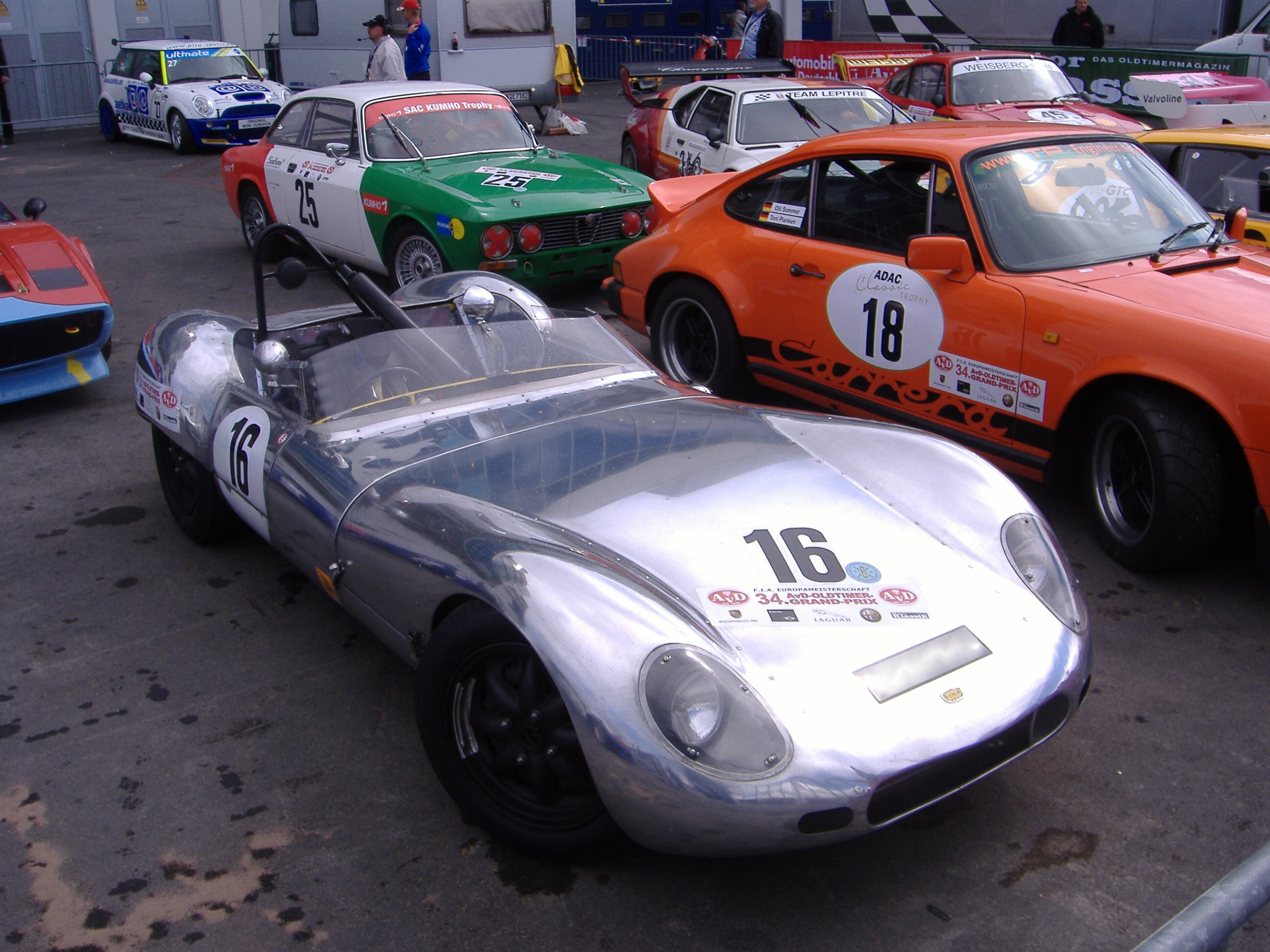 Lola Mk 1 AVD Oldtimer Grand Prix Nürburgring 13.08.2006